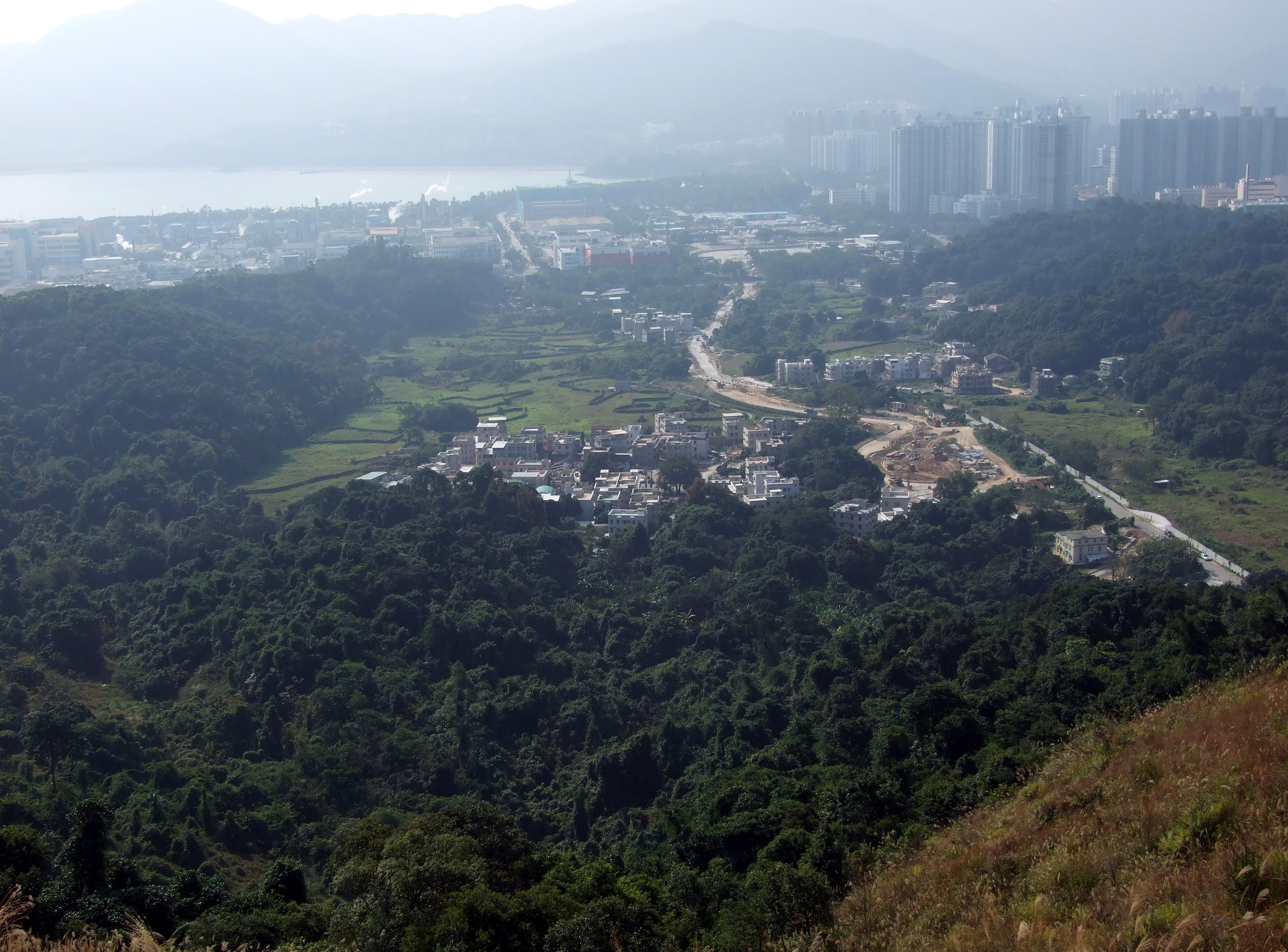 中文（香港）: 鳳園谷